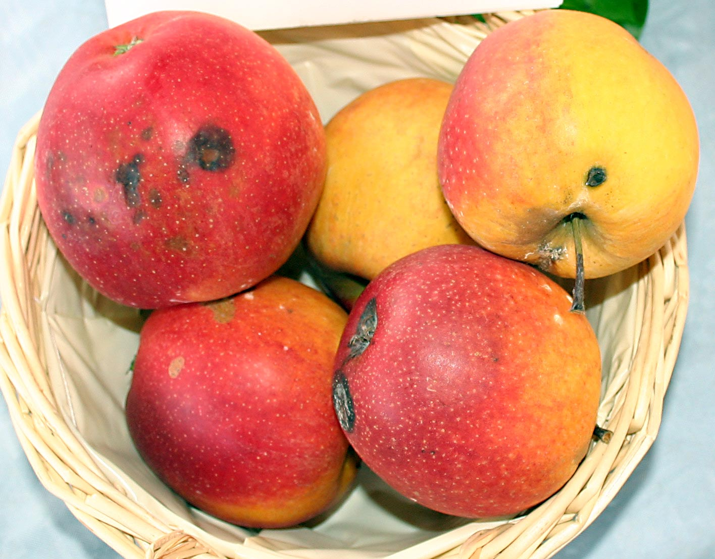 Malus "Mutterapfel", Büdingen